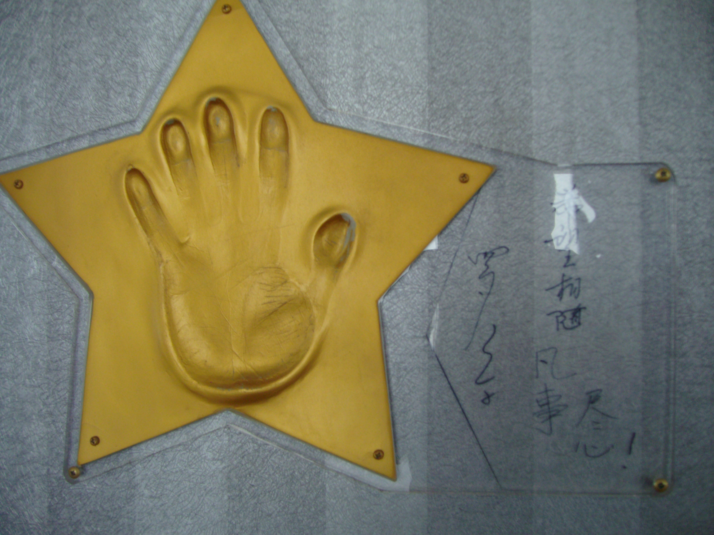 中文（中国大陆）: 央视已故主持人罗京在中央电视塔留下的笔迹与手印